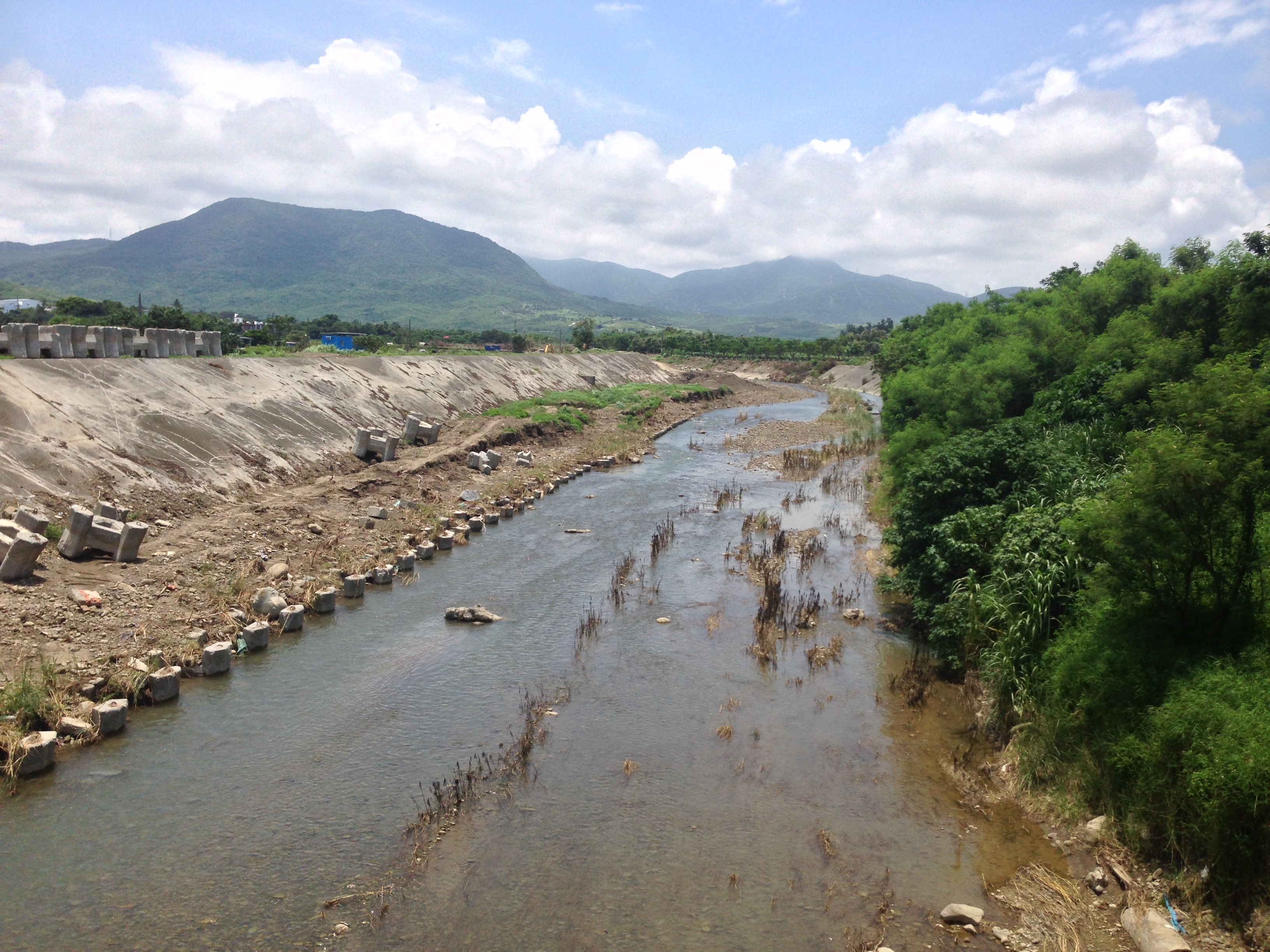 流經車城鄉保力村的保力溪。